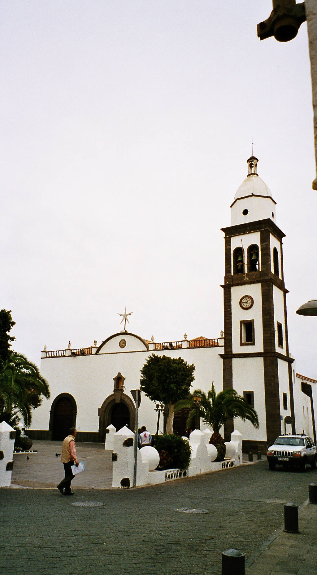 Iglesia de San Ginés, Arrecife, Lanzarote